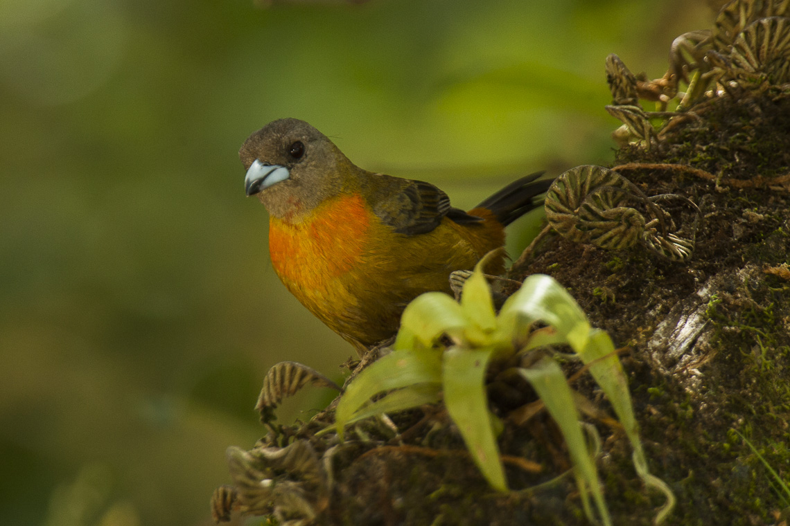 Scarlet-rumped Tanager fem - Panama_H8O1818